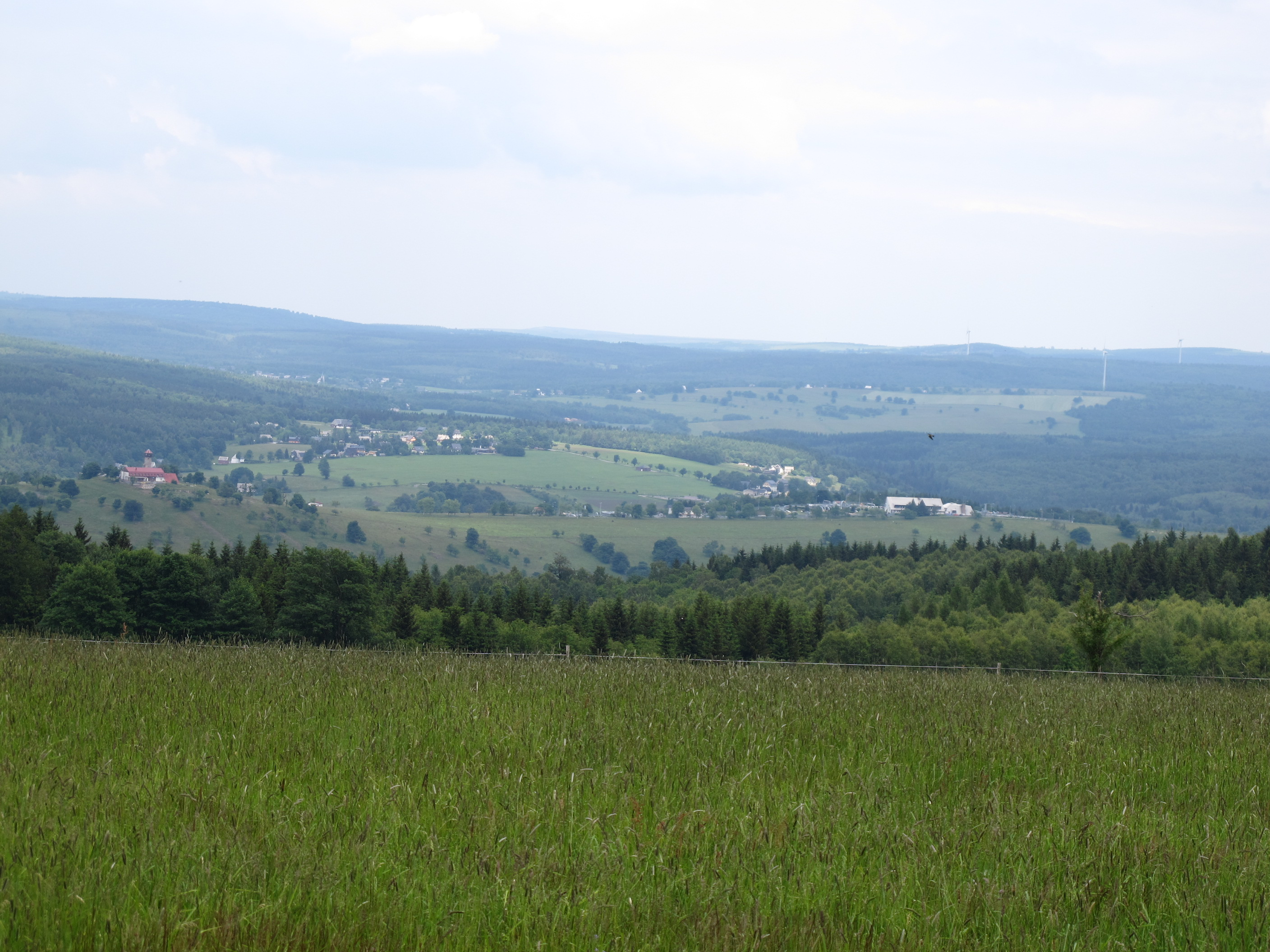 Pohled od Malého Háje na Horu Svaté Kateřiny, Deutschneudorf a Novou Ves v Horách